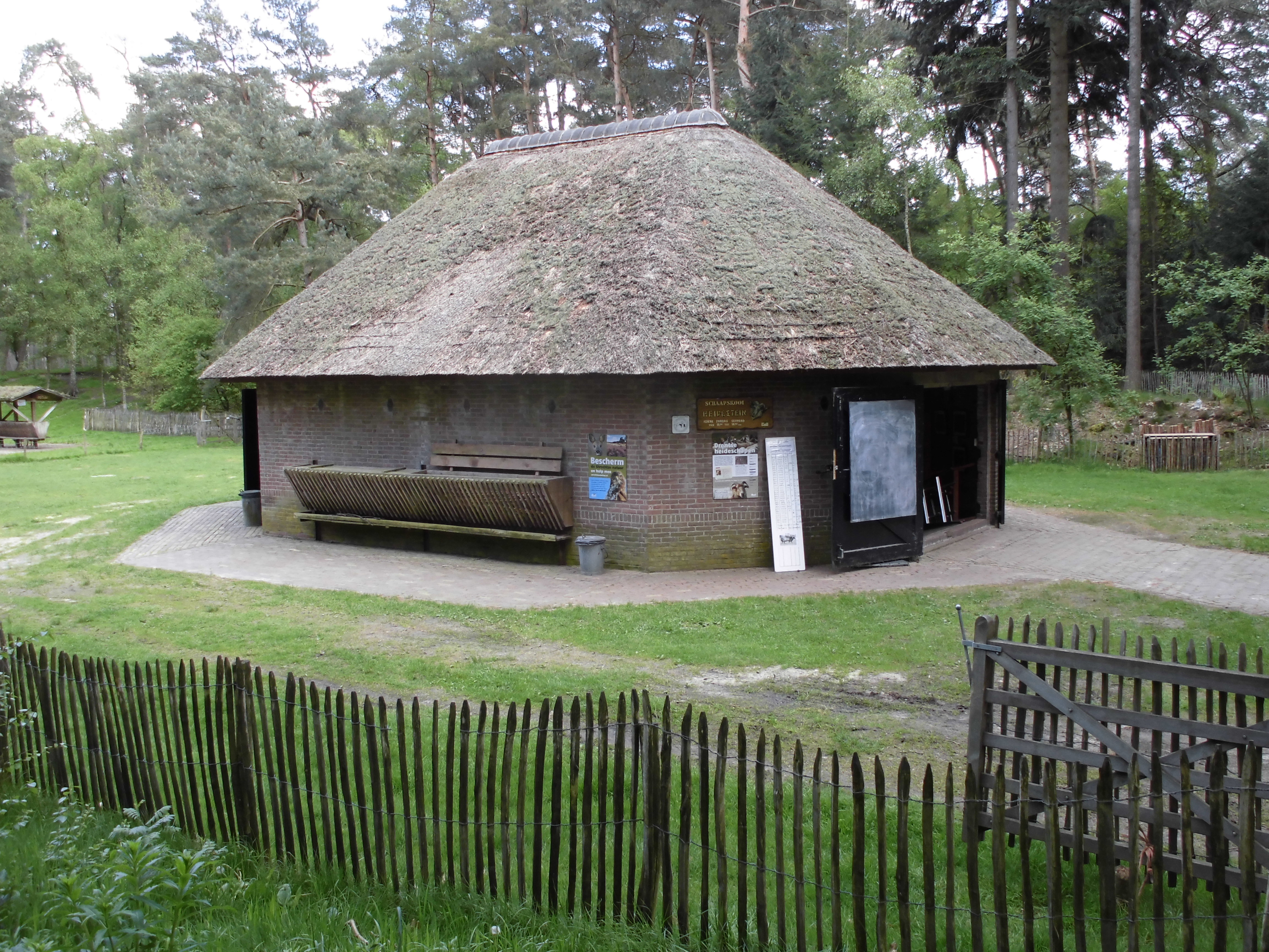 informatiecentrum Schaapskooi Heidestein Driebergen-Rijsenburg